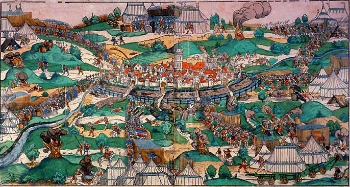 The city of Münster under siege by prince bishop Franz von Waldeck in 1534. The picture shows the first attack at Pentecost. The text below the image says: "Ein verzeychnung der Stat Münster mit all irer gelegenheit / mauren / thüren / zinnen / waten / schrankken / pasteyen / unnd geweren / wassergreben. Auch wie die von irem Bischoff am Freytage vor Pfingsten / des M.D. xxxiiii. Jars berennt / (und?) Zibben legern ringhweis .... zu übergeben/und nachmals an Sant Egidien abent an fünff orten an gelauffen/ und hefftig gestürmbt worden. Alda ir seer vil vom Adel sambt andern kriegs volck auff beiden theylen erlegen seind / wie etlich sagen / bey drey tausenden! Gott..."